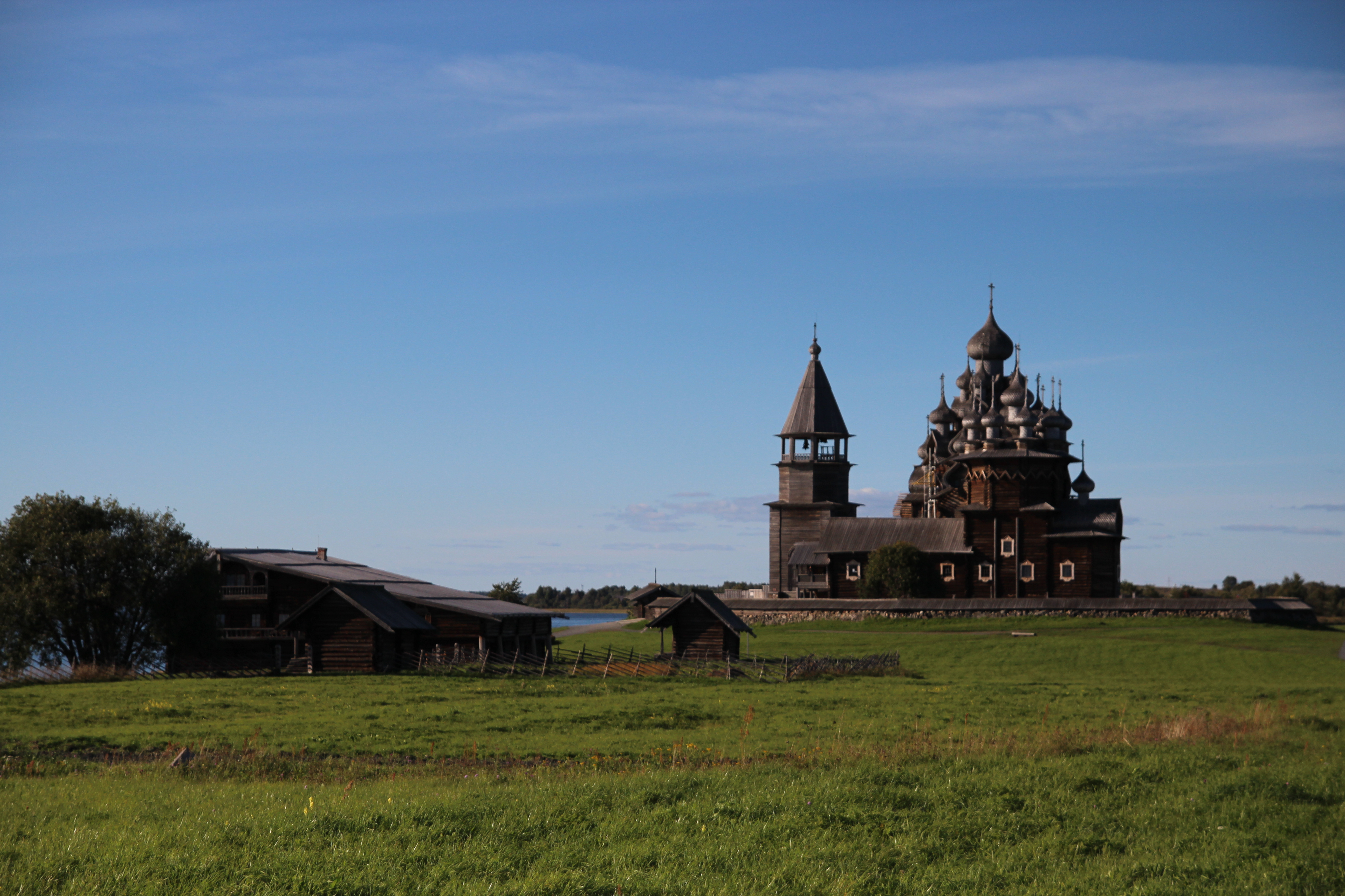 Кижский погост